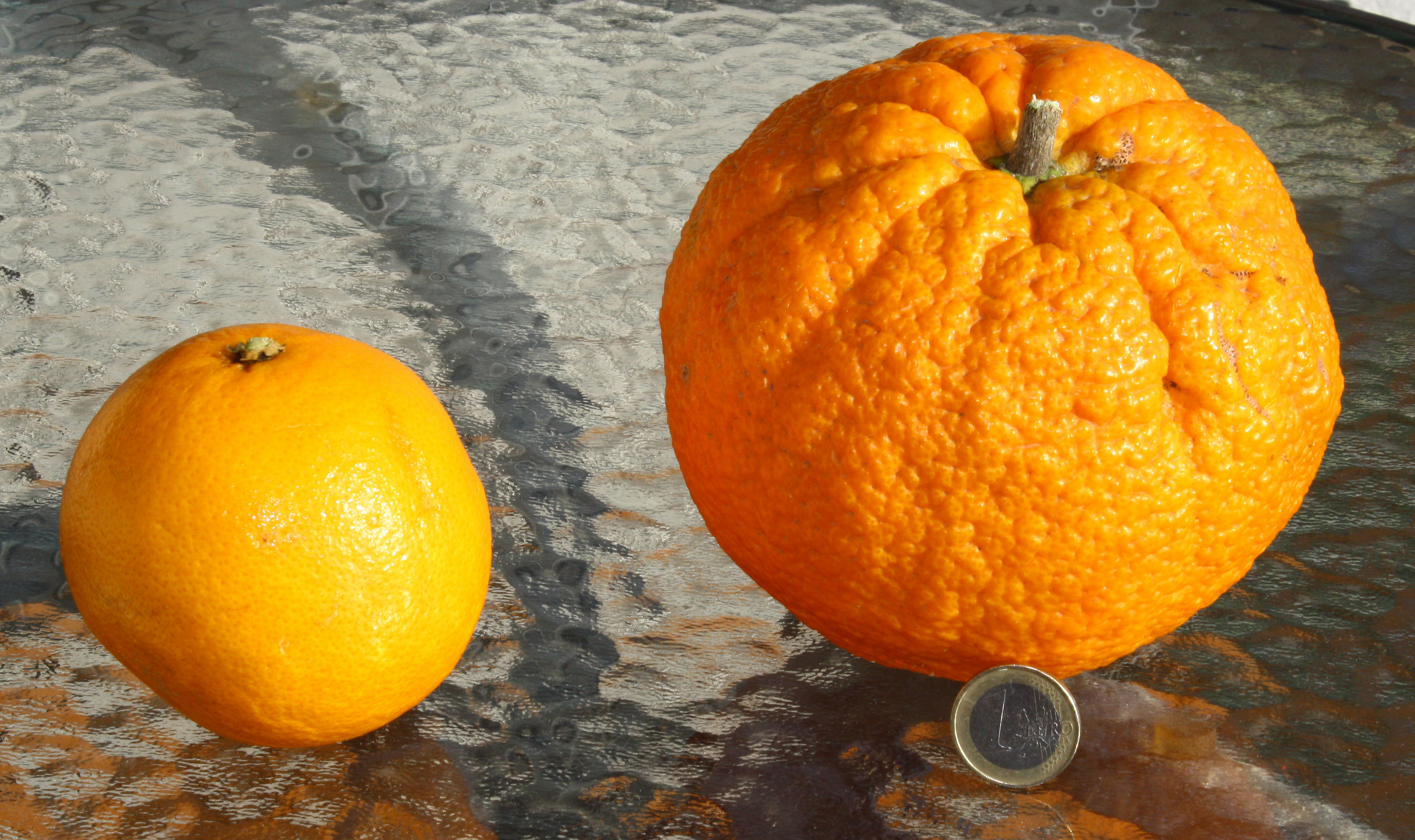 Naranja gigante comparada con una de mediano tamaño y un Euro